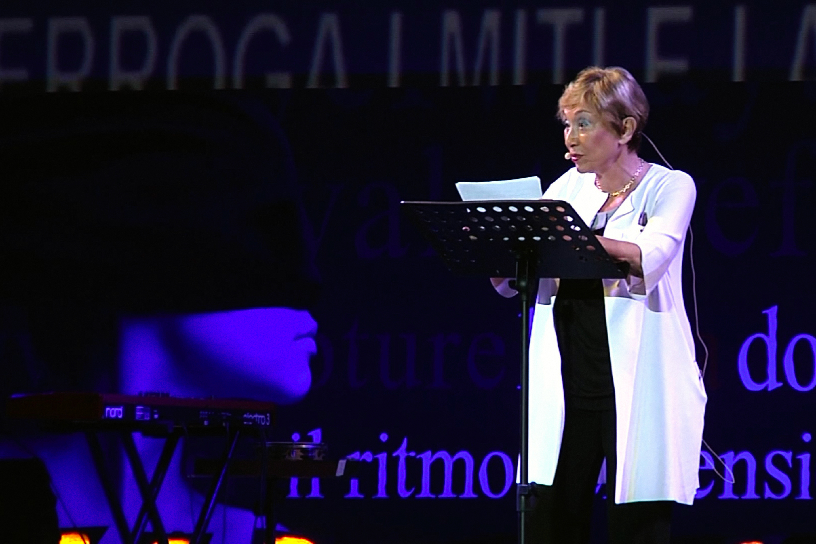 Julia Kristeva à Rome, en 2010, Festival Internazionale di Roma, 22 juin 2010, "La passione secondo Teresa d'Avila"